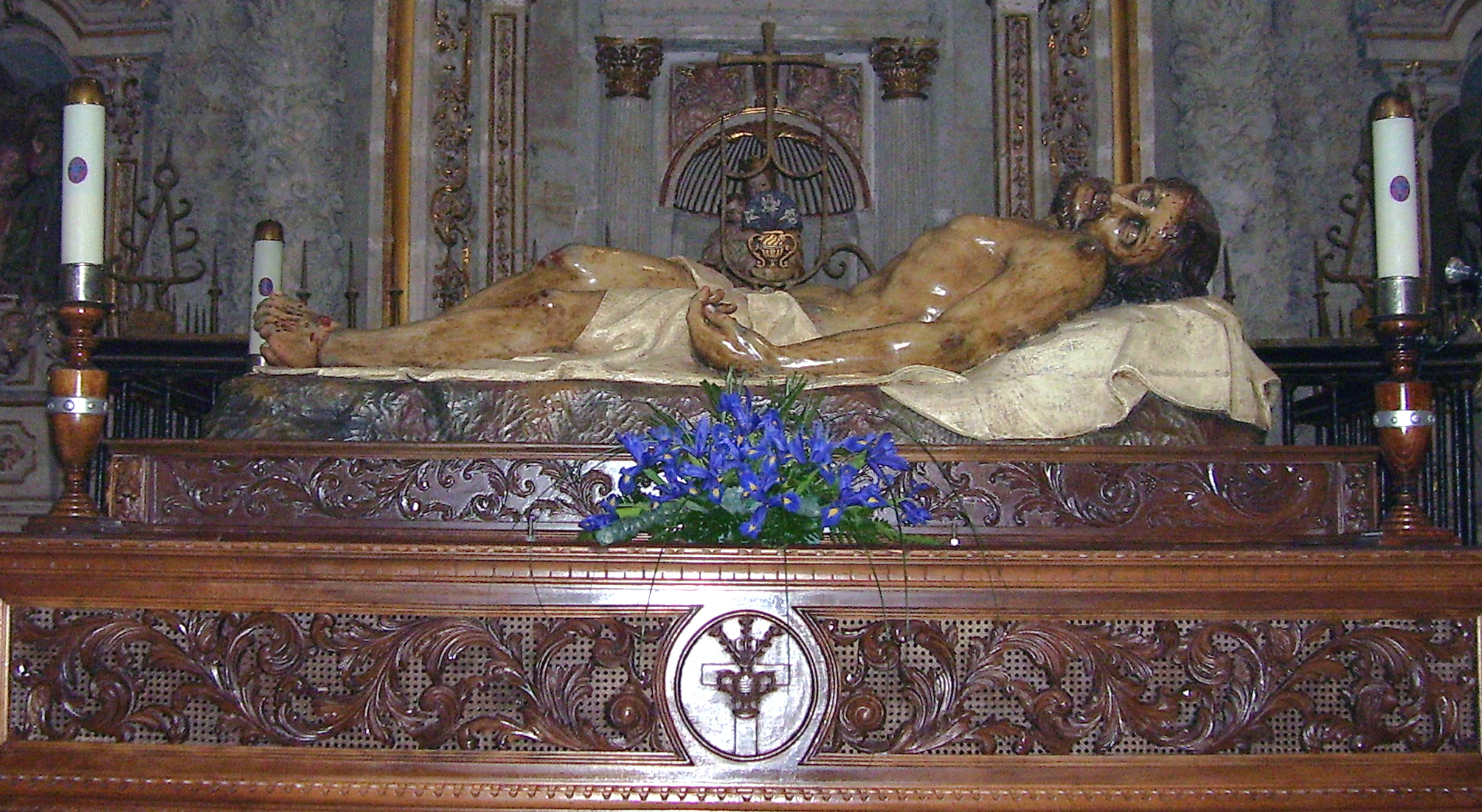 Cristo Yacente de la Misericordia, en la Capilla de San Bartolomé, también llamada de la Virgen de Morales, de la Catedral Nueva de Salamanca